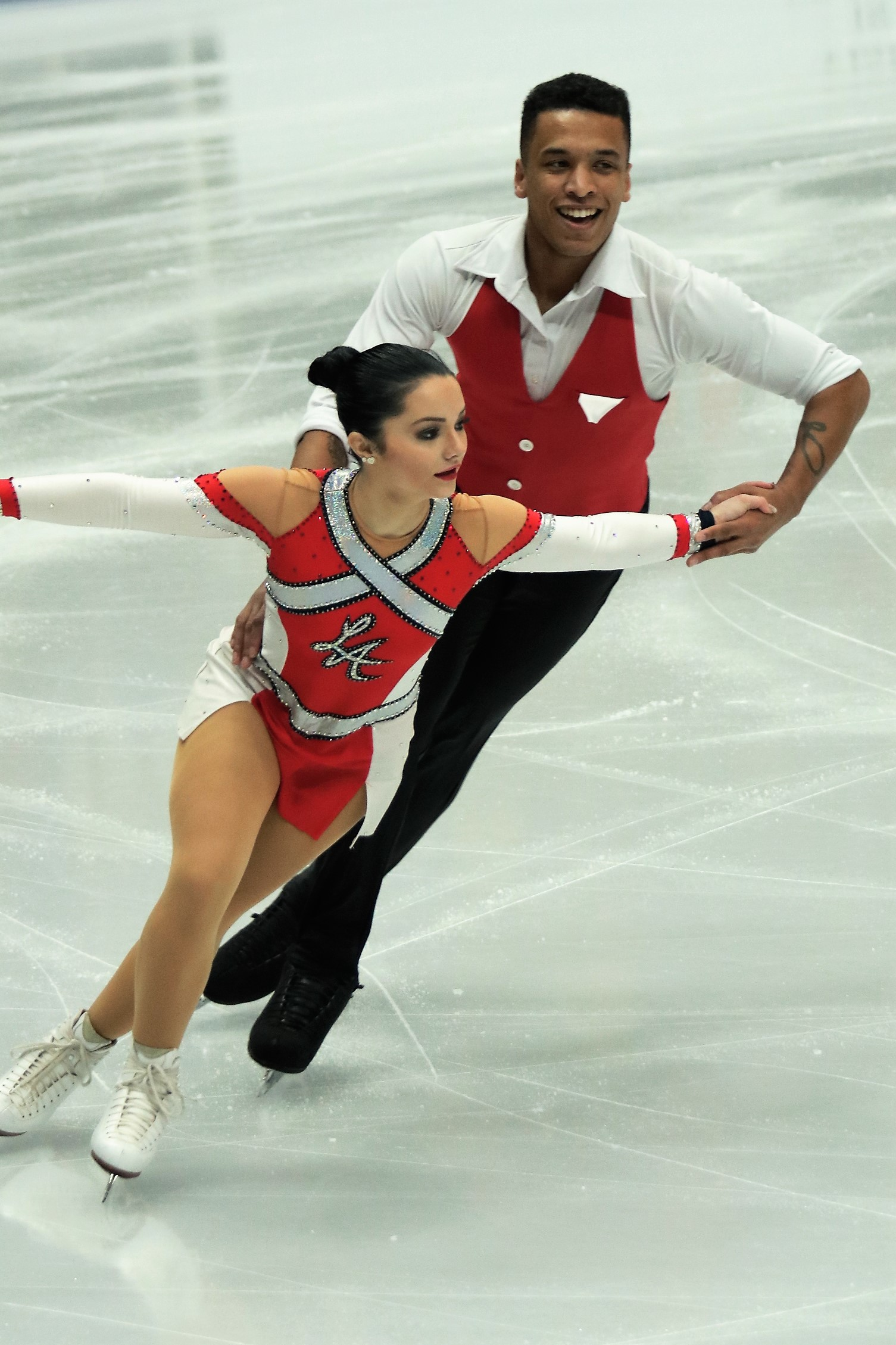 Лана Петранович и Антонио Соуза-Кордейру (Хорватия) на Чемпионате Европы по фигурному катанию 2018